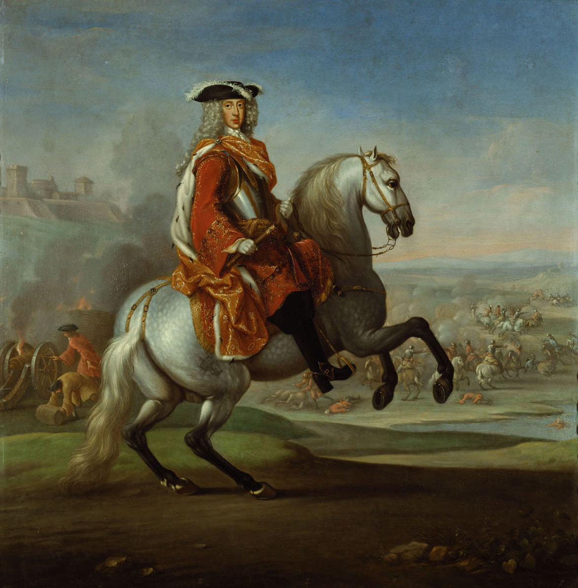 Herzog Karl V. von Lothringen (1643-1690) als Feldherr zu Pferd